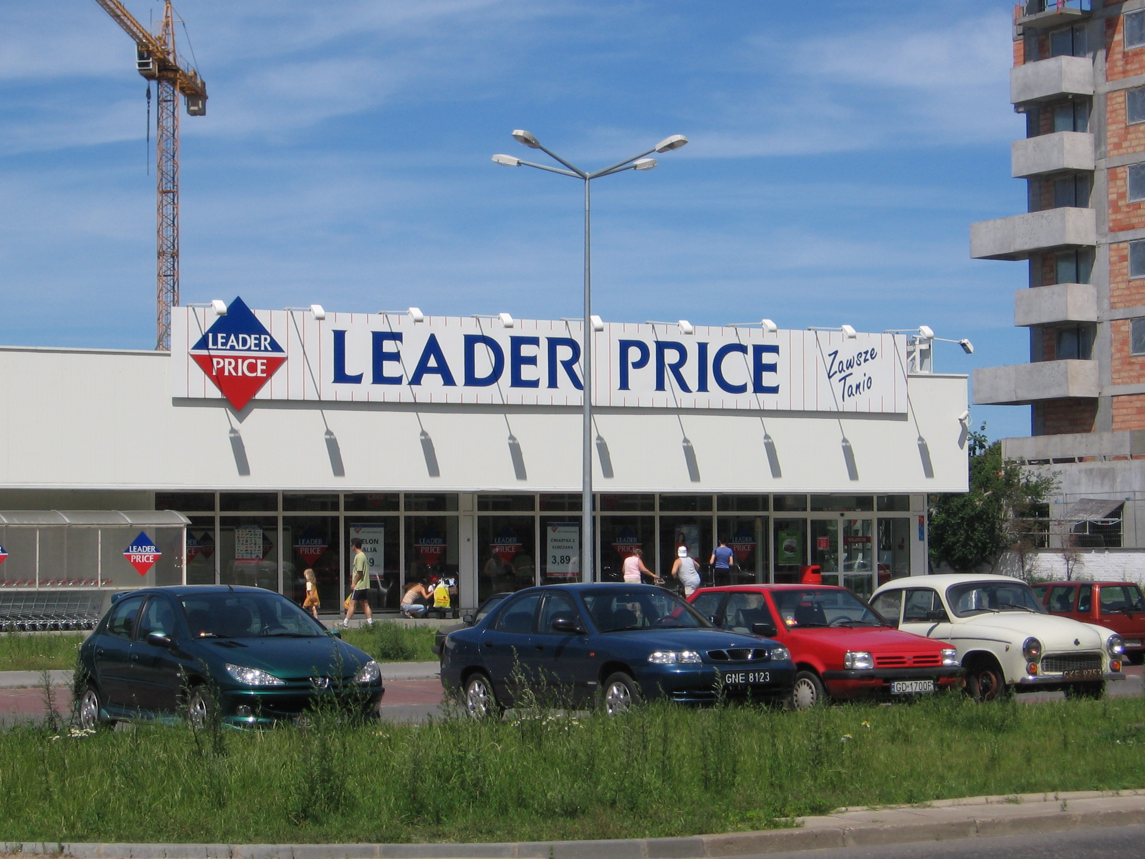 Leader Price supermarket, Gdansk, Poland.